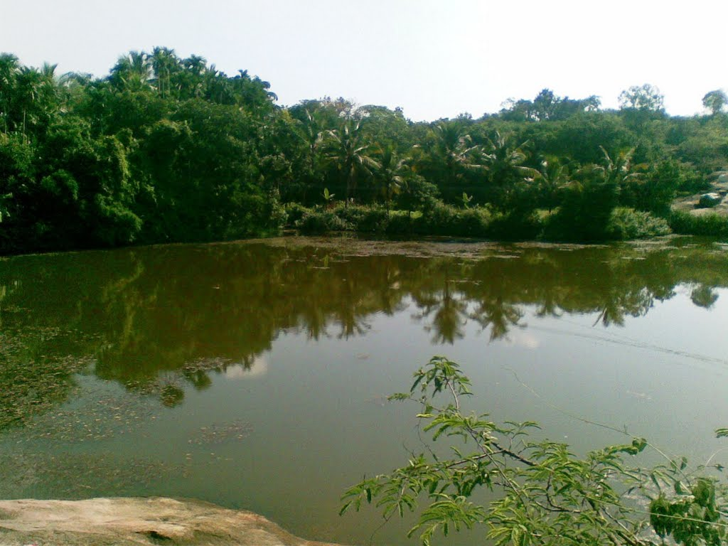 ಕನ್ನಡ: ಅಲೆವೂರು ಶ್ರೀ ದುರ್ಗಾಪರಮೇಶ್ವರಿ ದೇವಸ್ಥಾನ